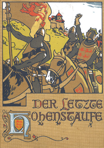 Umschlagillustration zu Franz Treller: "Der letzte Hohenstaufe"